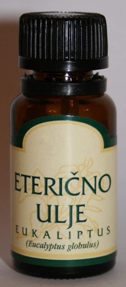 Eterično ulje eukaliptusa